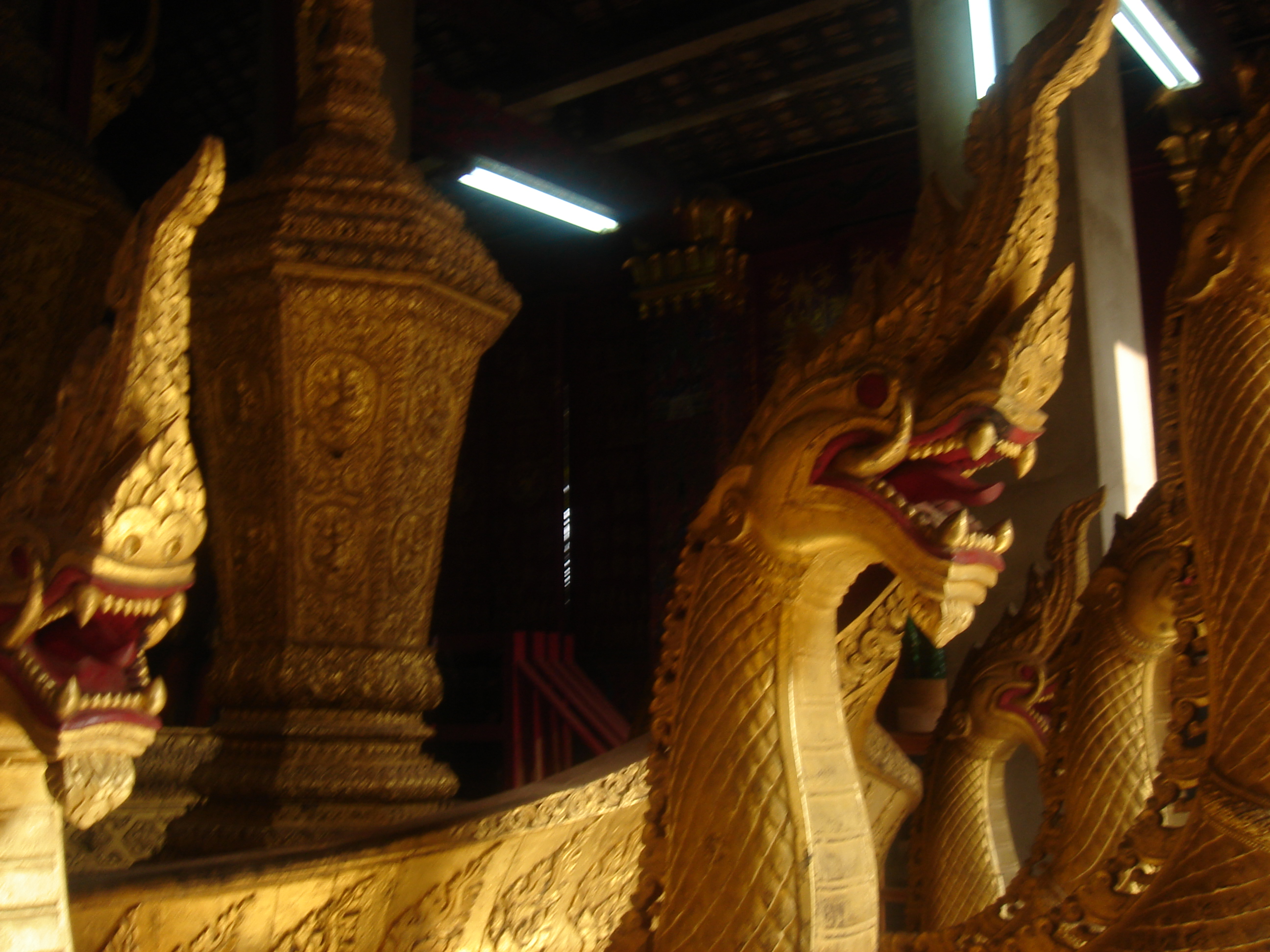 Nagas Royal Funerary Carriage Wat Xieng Thong, Laos.